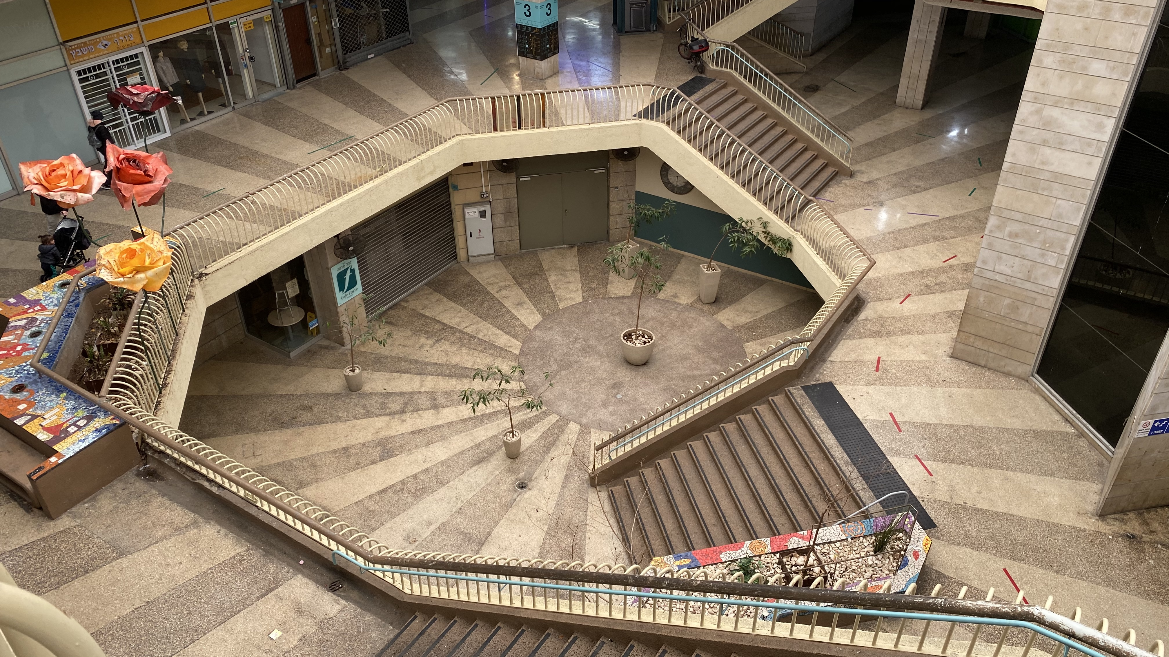 מבט לכיוון מטה. האטריום במרכז כלל ירושלים.